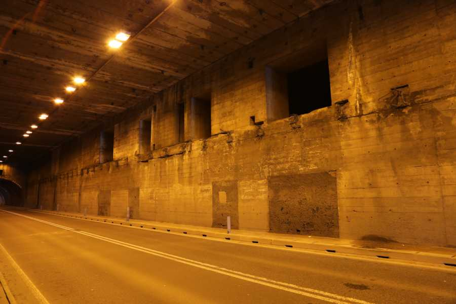 Straßentunnel der Olympiastraße (Bundesstraße 2), ehemalige U-Verlagerung „Ente“ in Eschenlohe (Landkreis Garmisch-Partenkirchen, Bayern), unterirdische Rüstungsproduktion Bayern, Messerschmitt Flugzeugbau BF 109 und ME 262.